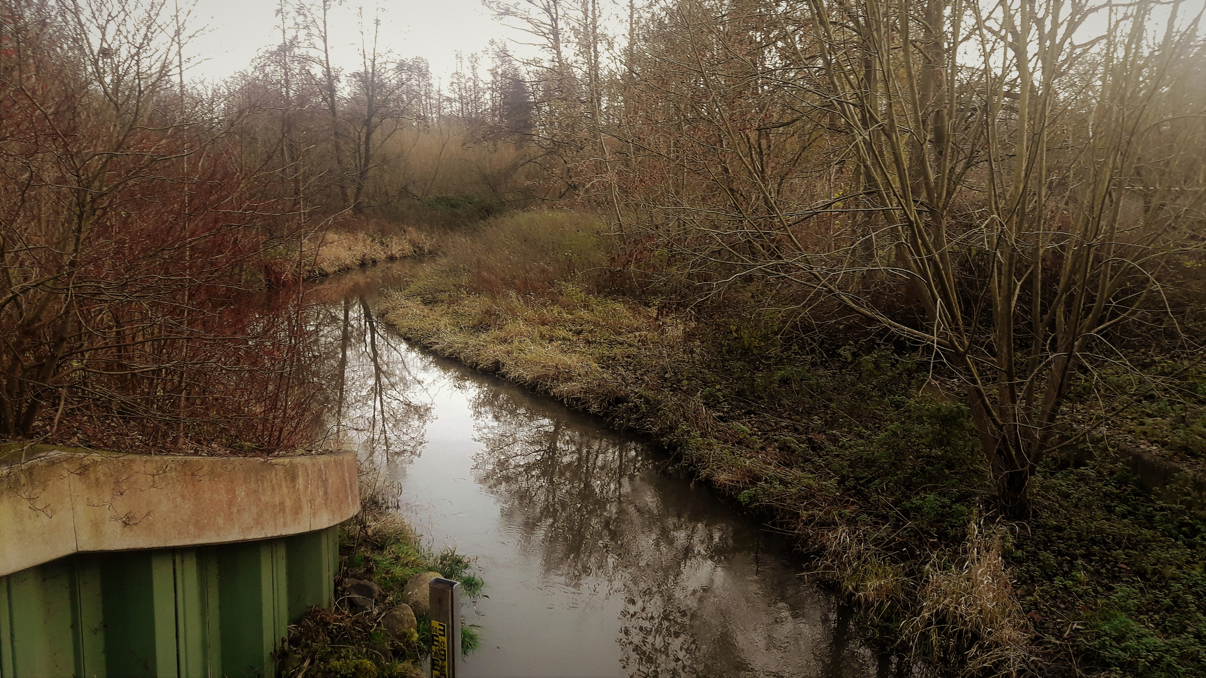 Vaade kagusse Maurine jõele kunagise piiskopilinnuse alal oleva veskikoha juurest. Veski jäi pealinnusest põhja või kirde poole.